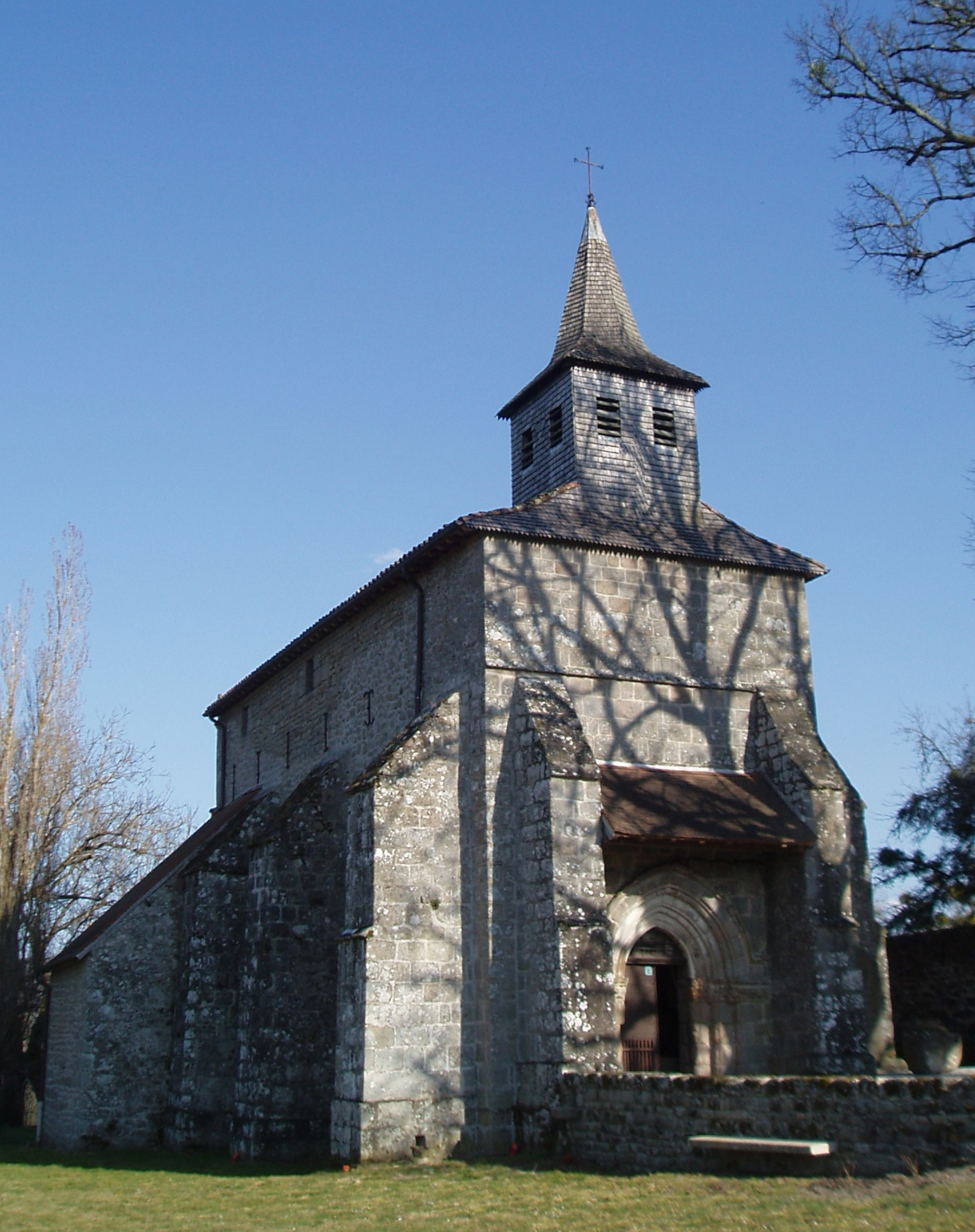 Eglise